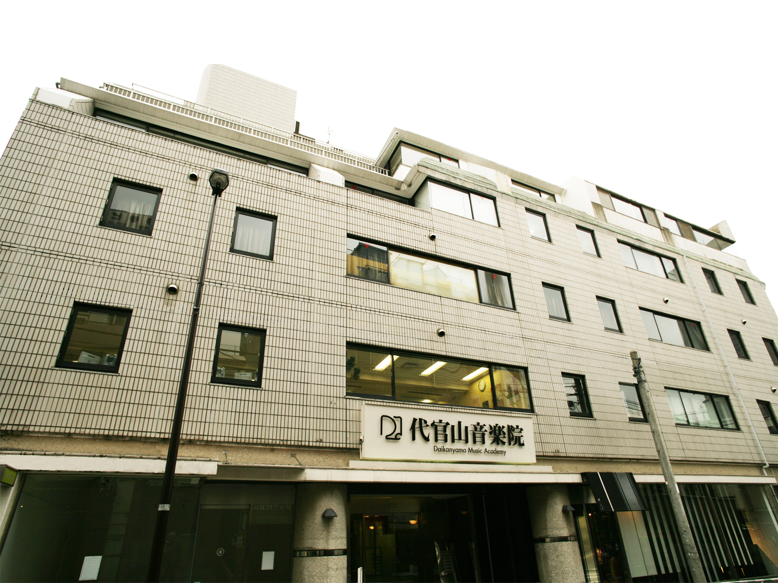 代官山音楽院外観写真2